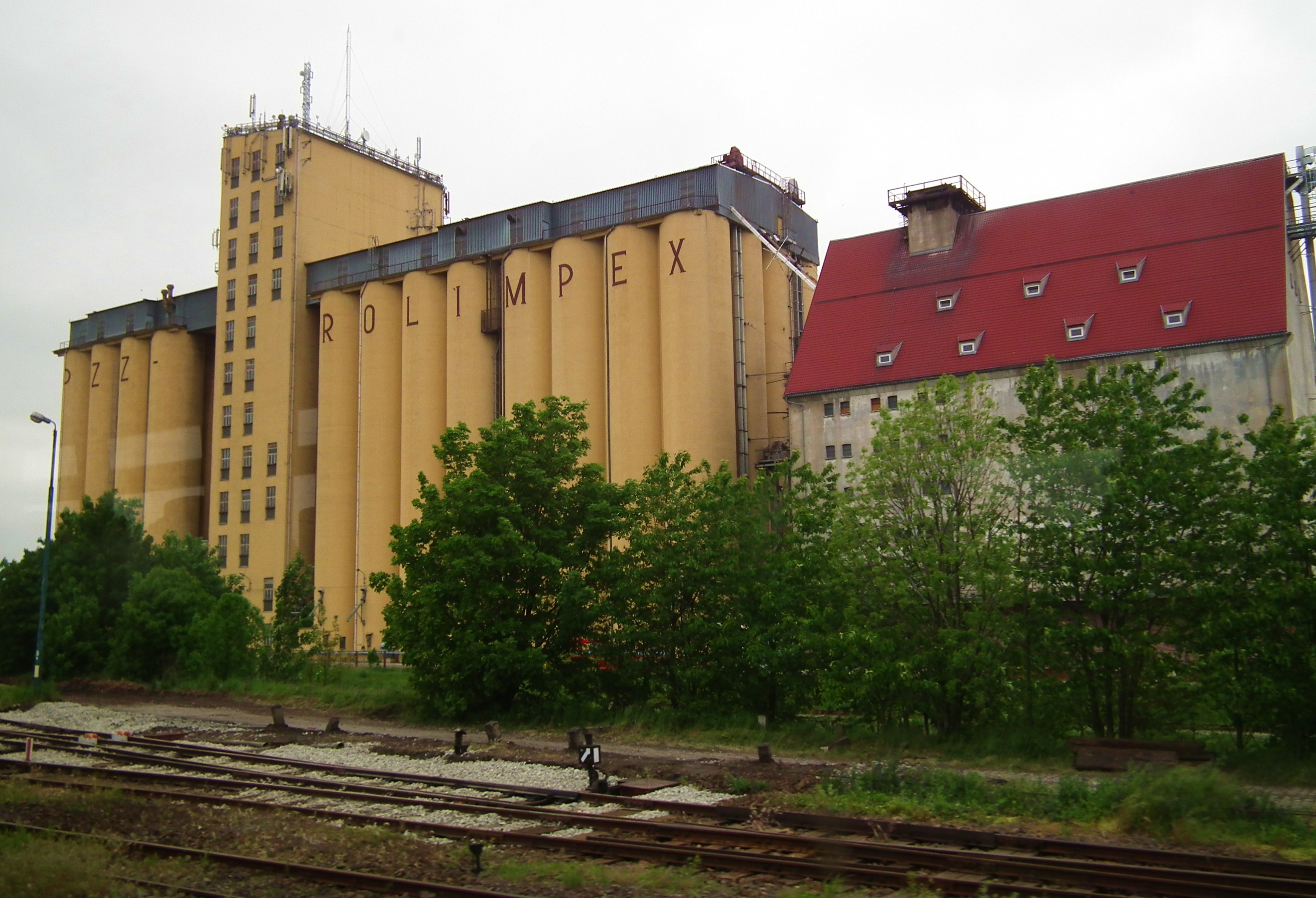 Prudnik, elewator